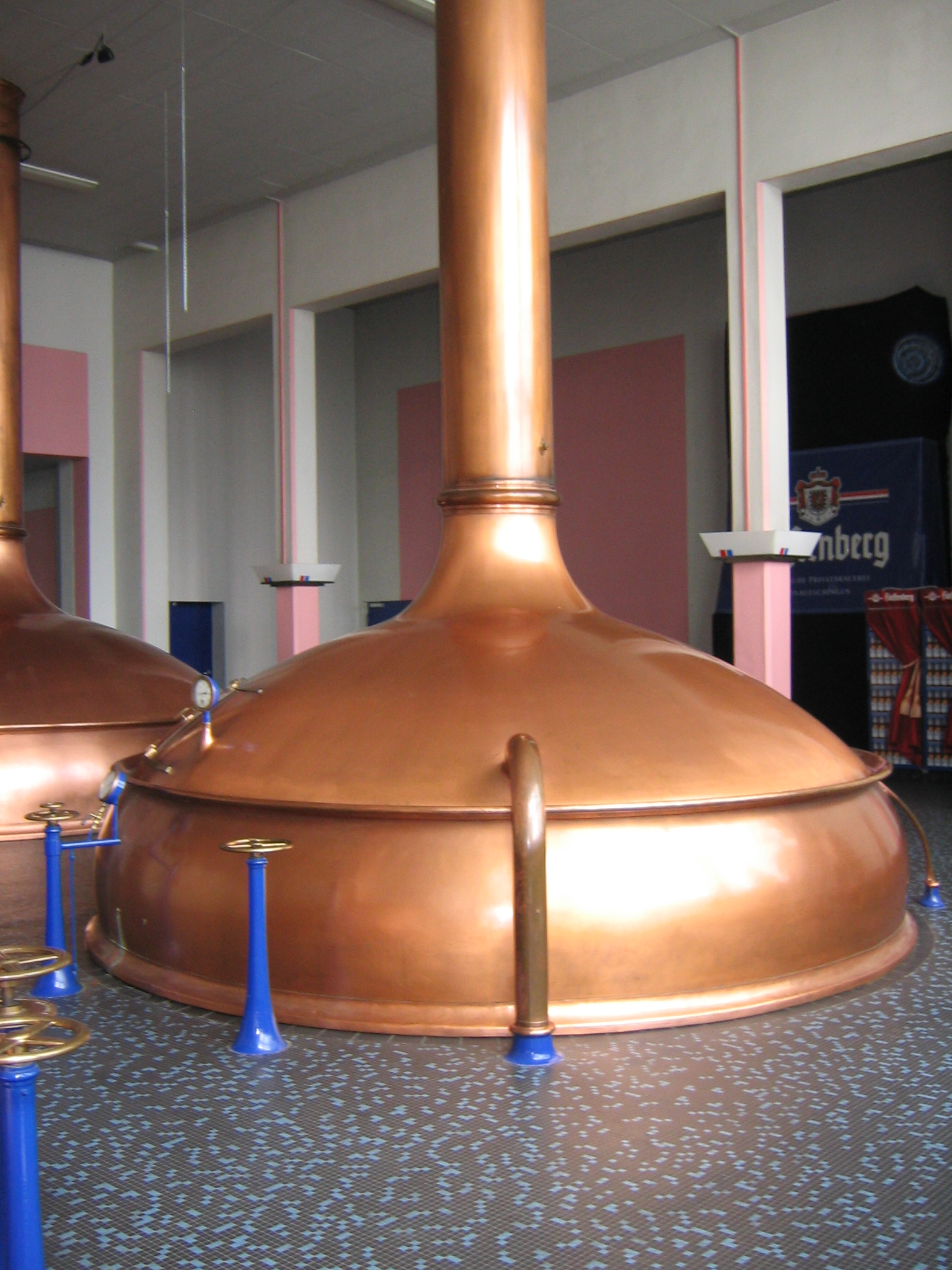 Sudfass in der Brauerei Fürstenberg, Donaueschingen